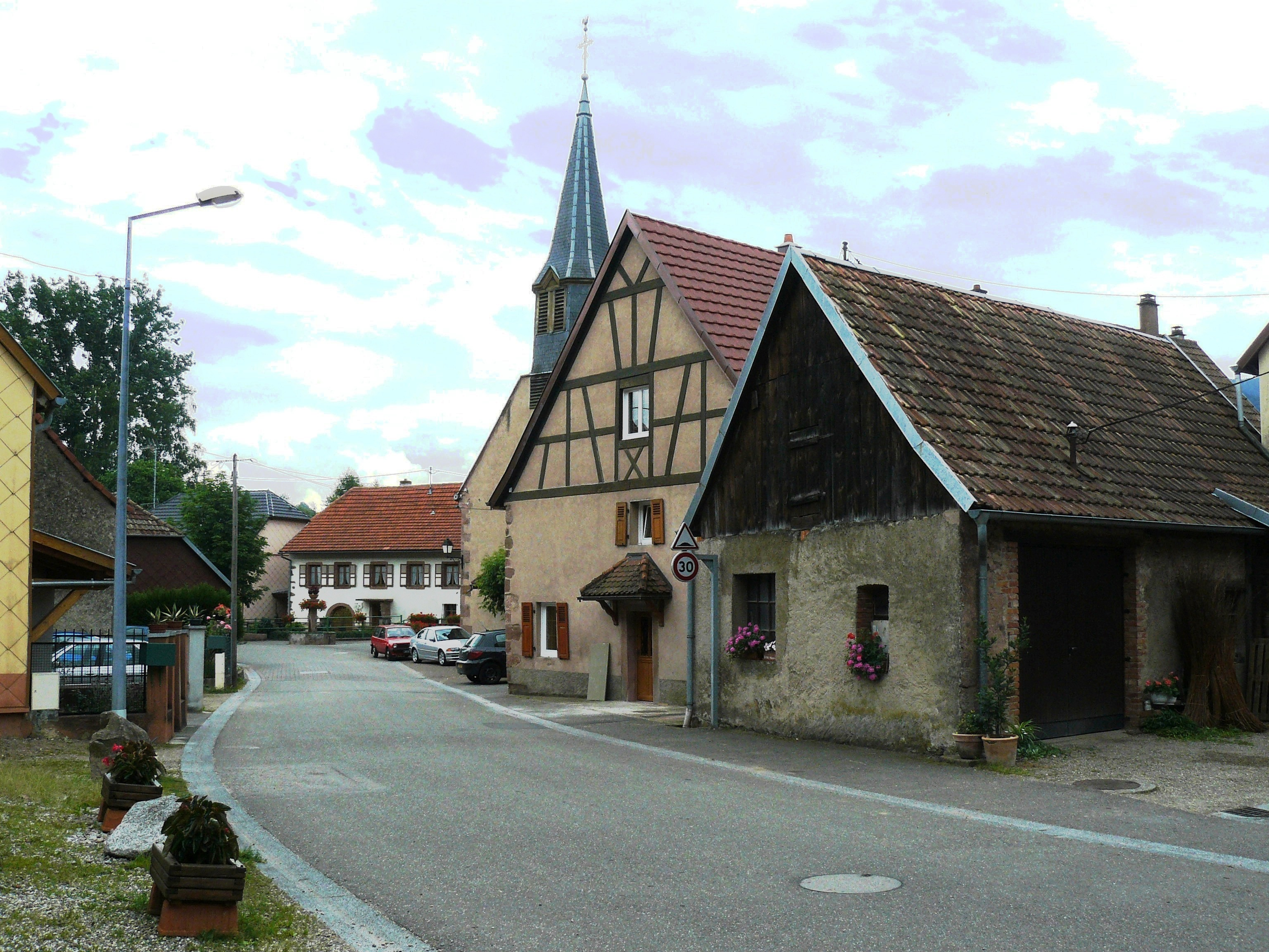 Vue sur l'artère principale du village de Bassemberg